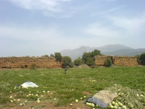 Mur de près de 400 mètres bien conservé